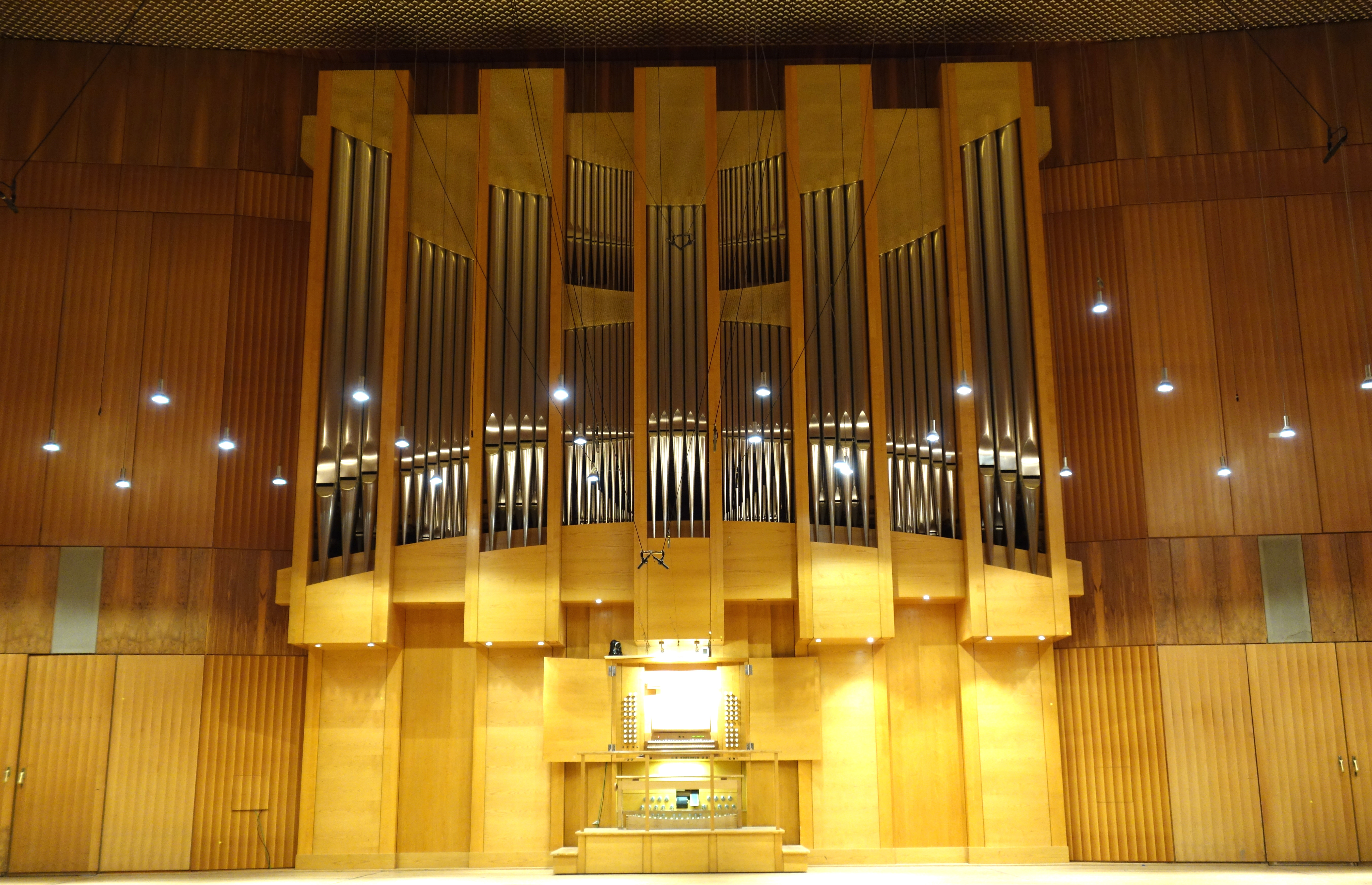 Kuhn-Orgel der Hochschule für Musik und Theater in München (1999, Orgelbau Kuhn, III/52)